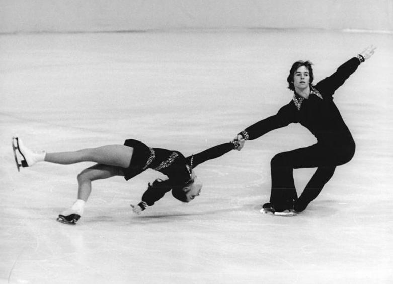 Romy Kermer, Rolf Österreich ADN-ZB Mittelstädt 11.1.1974-hf-Berlin: Meisterschaften der DDR im Eiskunstlaufen vom 11.-13.1.1974.- Romy Kermer - Rolf Oesterreich vom SC Dynamo Berlin, hier bei ihrer Pflichtkür, führen nach der Pflicht und dem Kurzprogramm die Konkurrenz der Paare an. An zweiter Stelle Titelverteidiger Groß - Kagelmann, 3. Katja und Knud Schubert ( beide Paare ebenfalls vom SC Dynamo Berlin).